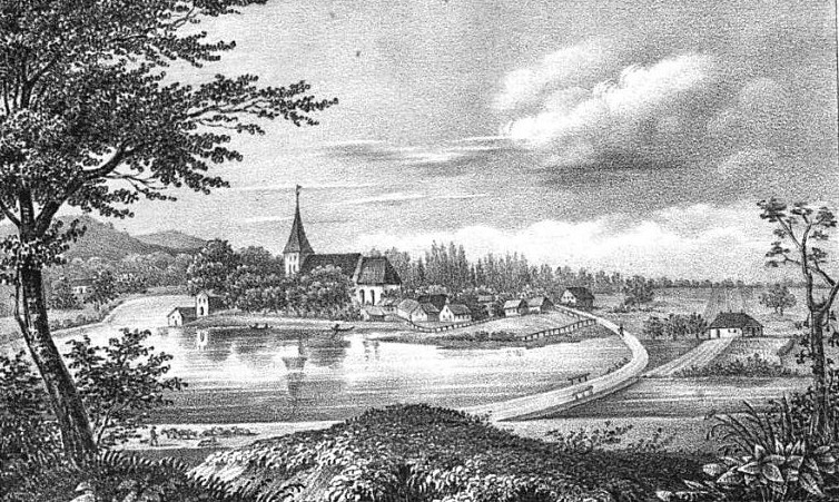 Ansicht von Wargen im Samland, Ostpreußen